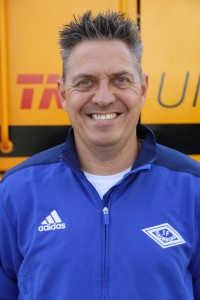 Trainer